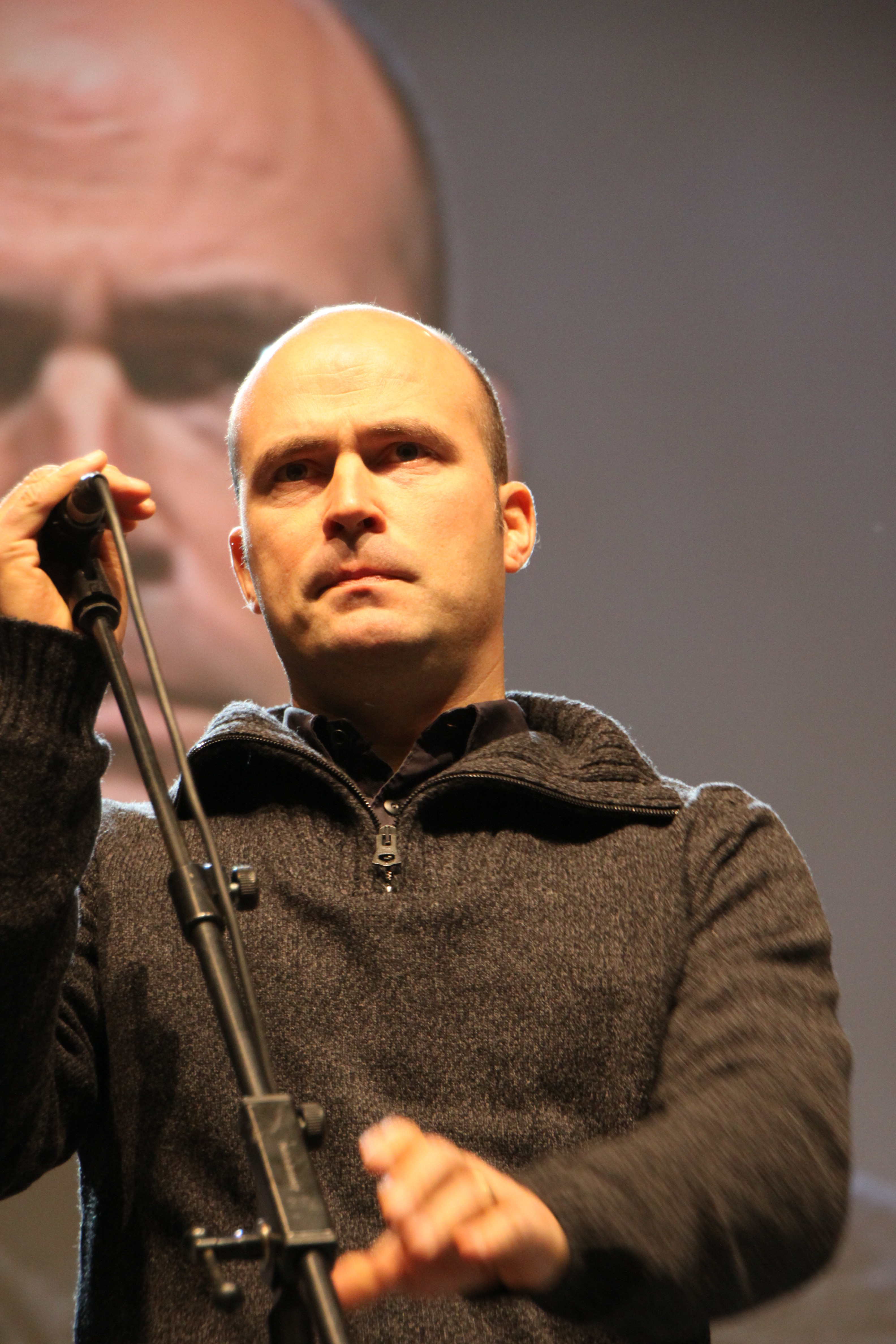 2013ko abenduaren 15ean jokatu zen Barakaldoko BECen Bertsolari Txapelketa Nagusia. Maialen Lujanbio, Aitor Mendiluze, Amets Arzallus, Sustrai Colina, Aitor Sarriegi, Beñat Gaztelumendi, Igor Elortza eta Unai Iturriaga igo ziren oholtzara, 13.500 bertsozaleren aurrean. Bertsolari Txapelketa Nagusia 2017. Egilea: Uribe Kosta eta Erandioko agerkaria.